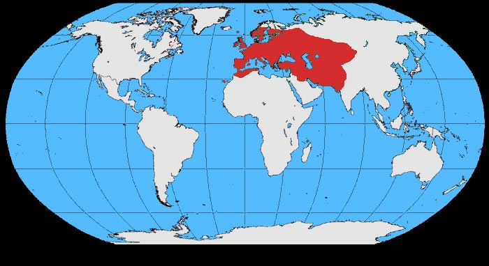 Corvus monedula map